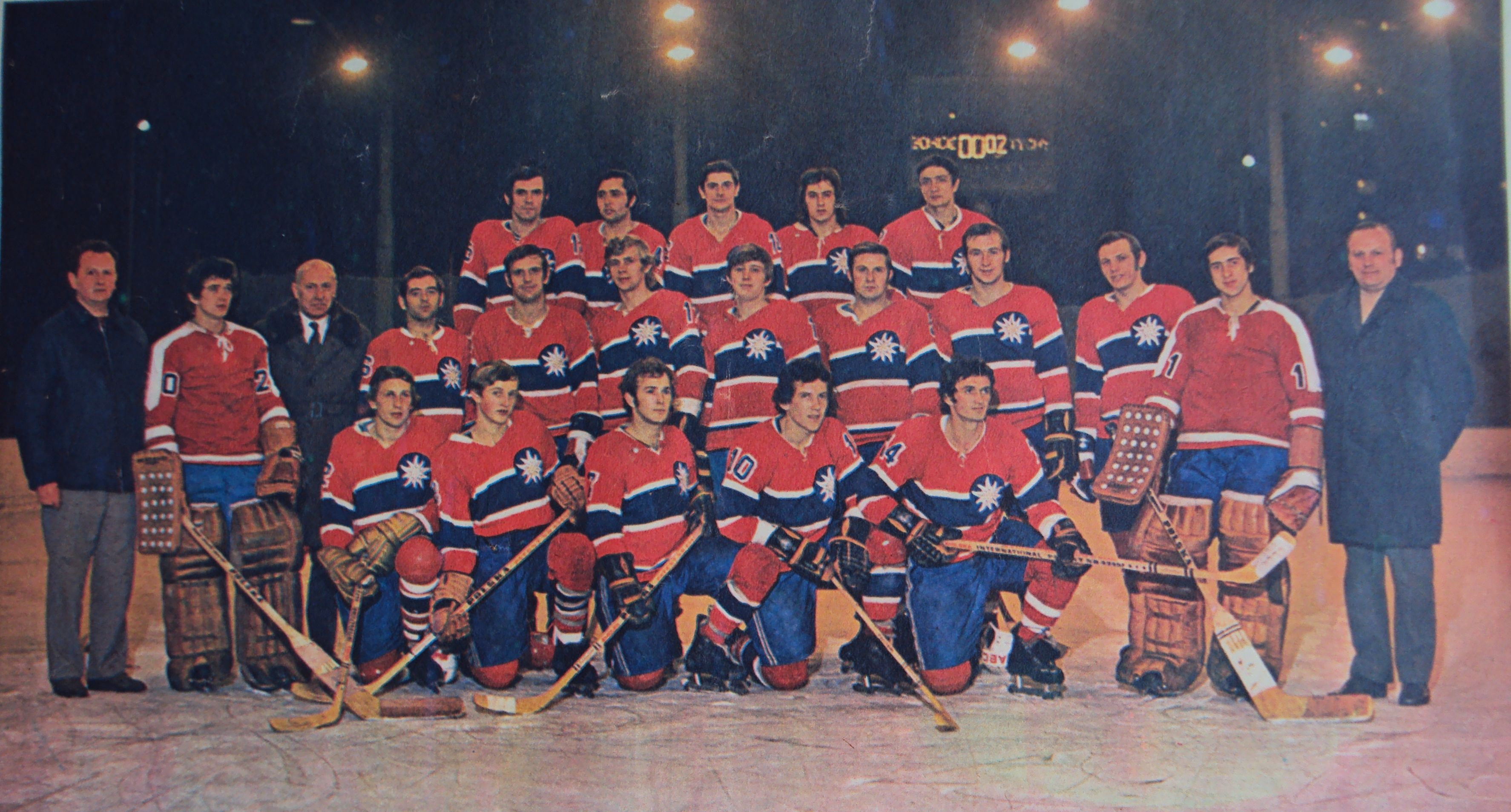 Mistrz Polski w hokeju na lodzie 1972